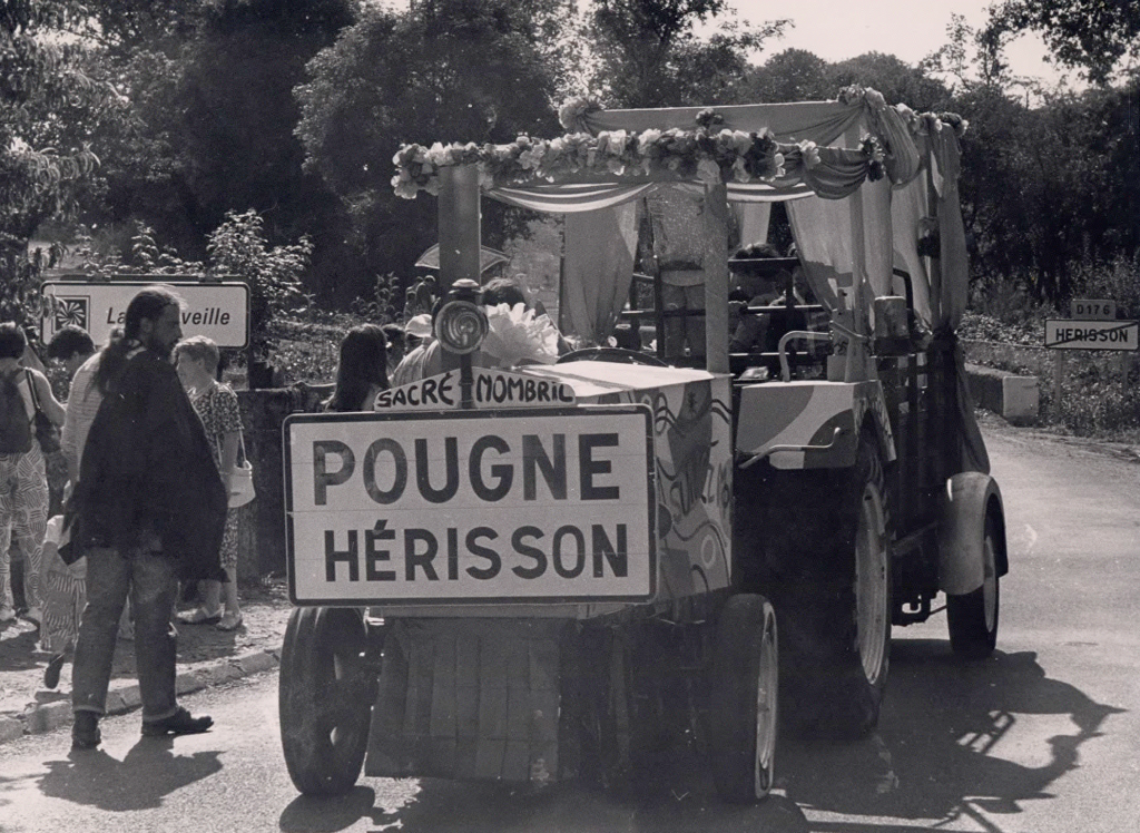 Le 15 août 1992, Yannick Jaulin présente son spectacle "Le nombril du monde" à Pougne-Hérisson et diverses manifestations s'y produisaient.